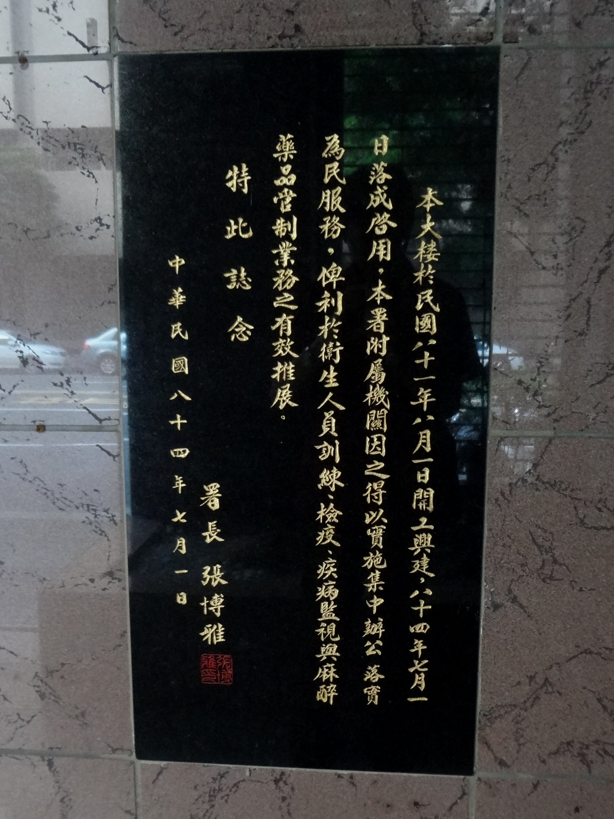 衛生福利部疾病管制署大樓（臺北市中正區林森南路6號）大門右側的落成紀念刻石，1995年（中華民國84年）7月1日行政院衛生署署長張博雅誌。